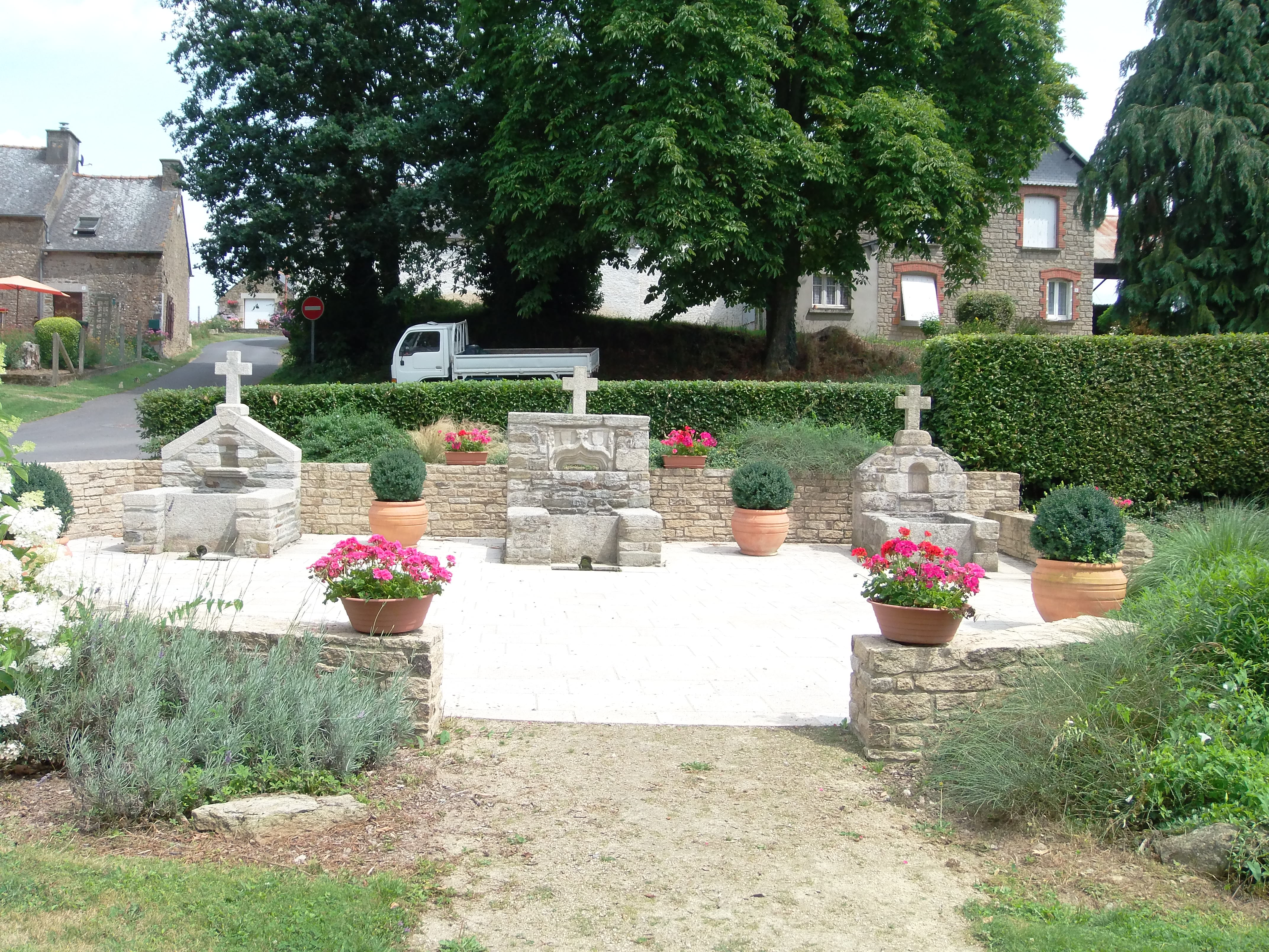 Vue cadrée sur les trois fontaines.